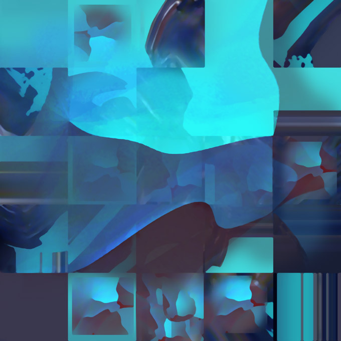 Benedek Jenő, ifj. (Csongrád, 1939. június 13.– 2019. augusztus 20.) festőművész alkotása: Képek és görbék, Év n., computergrafika